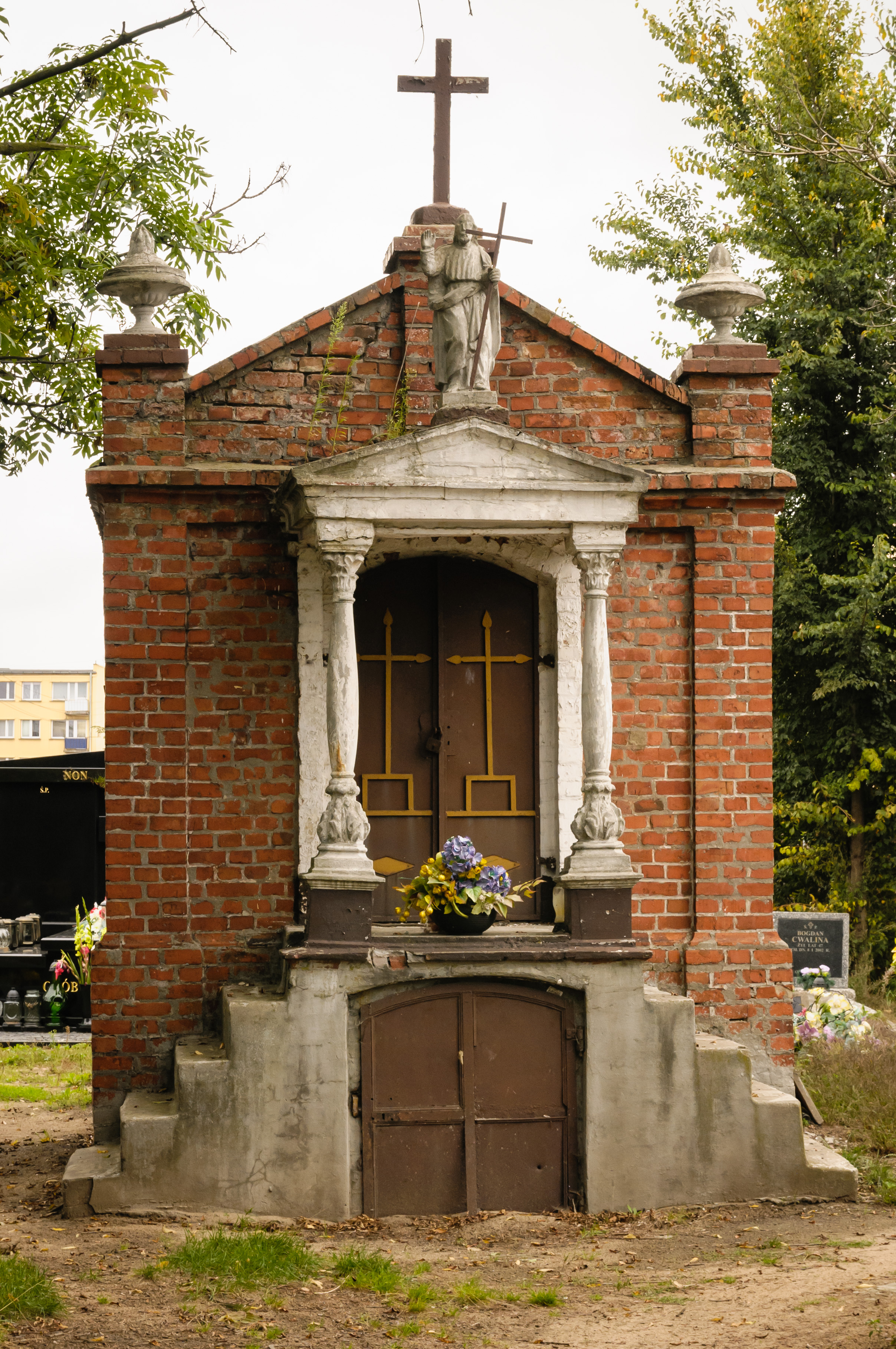 Mszczonów, kaplica grobowa, 1 poł. XIX